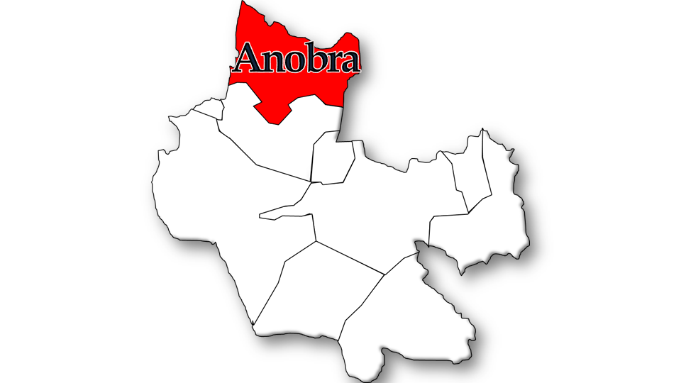 População